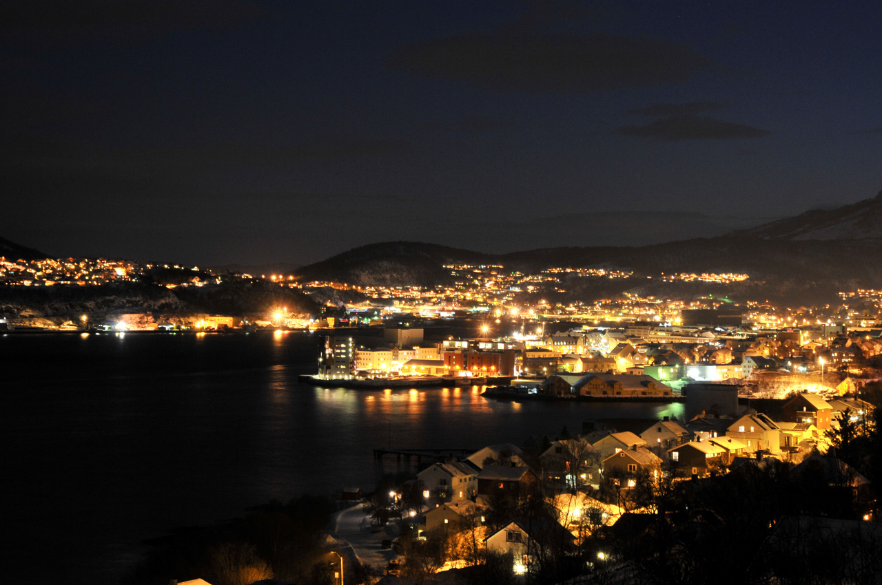 Harstad